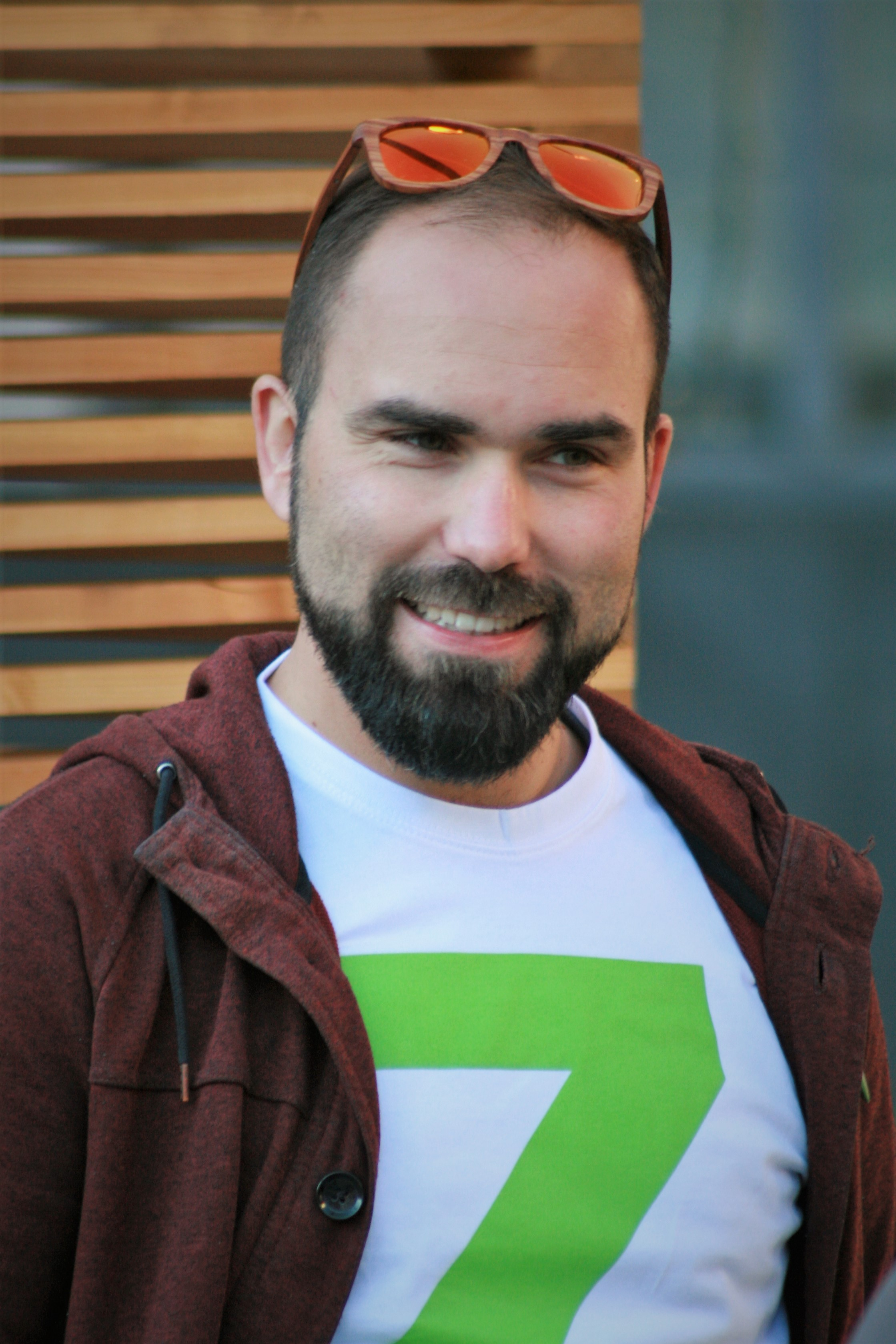 Jenda Perla, člen předsednictva Strany zelených a kandidát z druhého místa kandidátky do zastupitelstva Statutárního města Brna. Snímek z předvolebního stránku v Brně na náměstí Svobody před komunálními (a senátními) volbami v říjnu 2018.